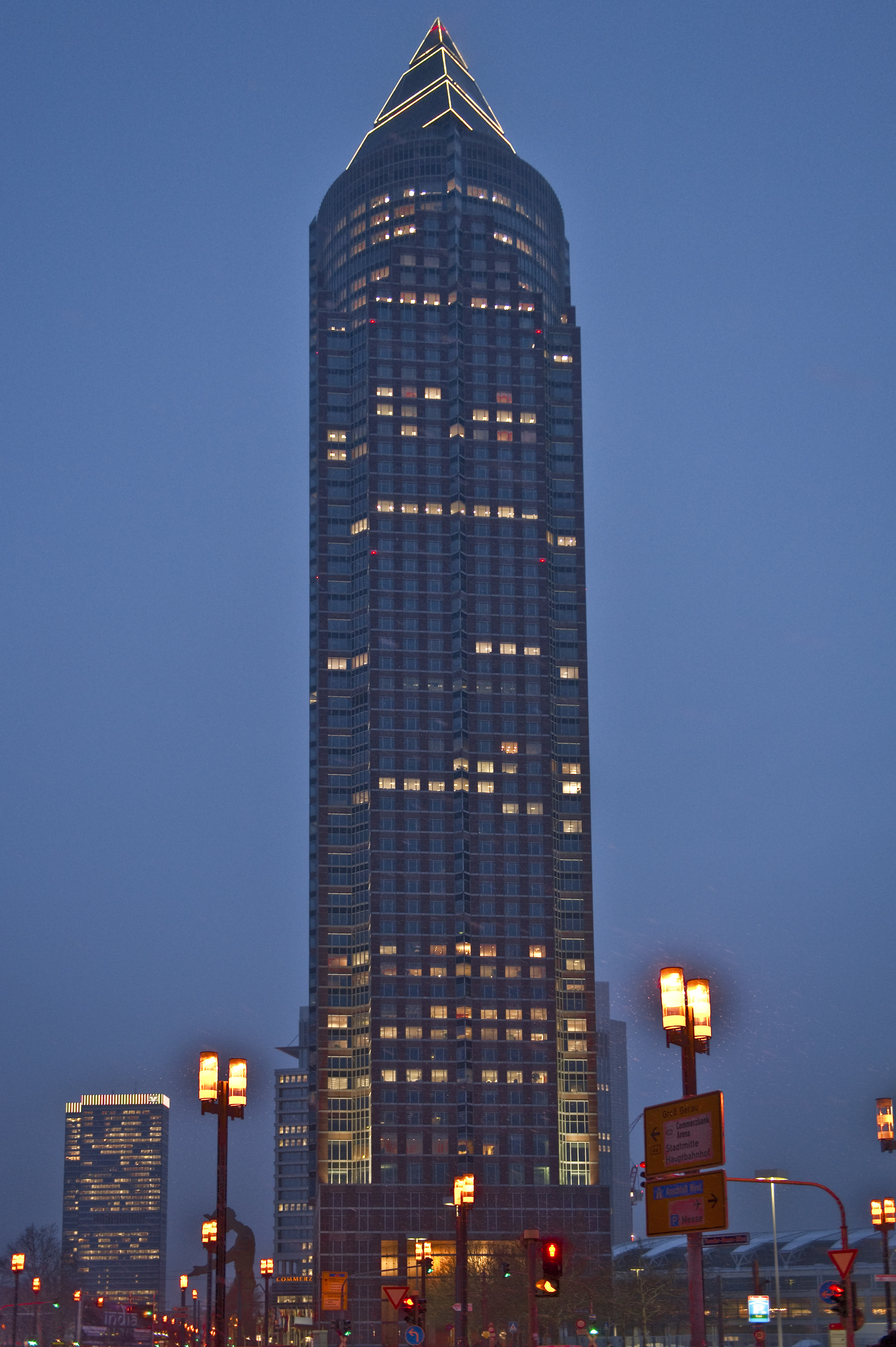 Frankfurt at night